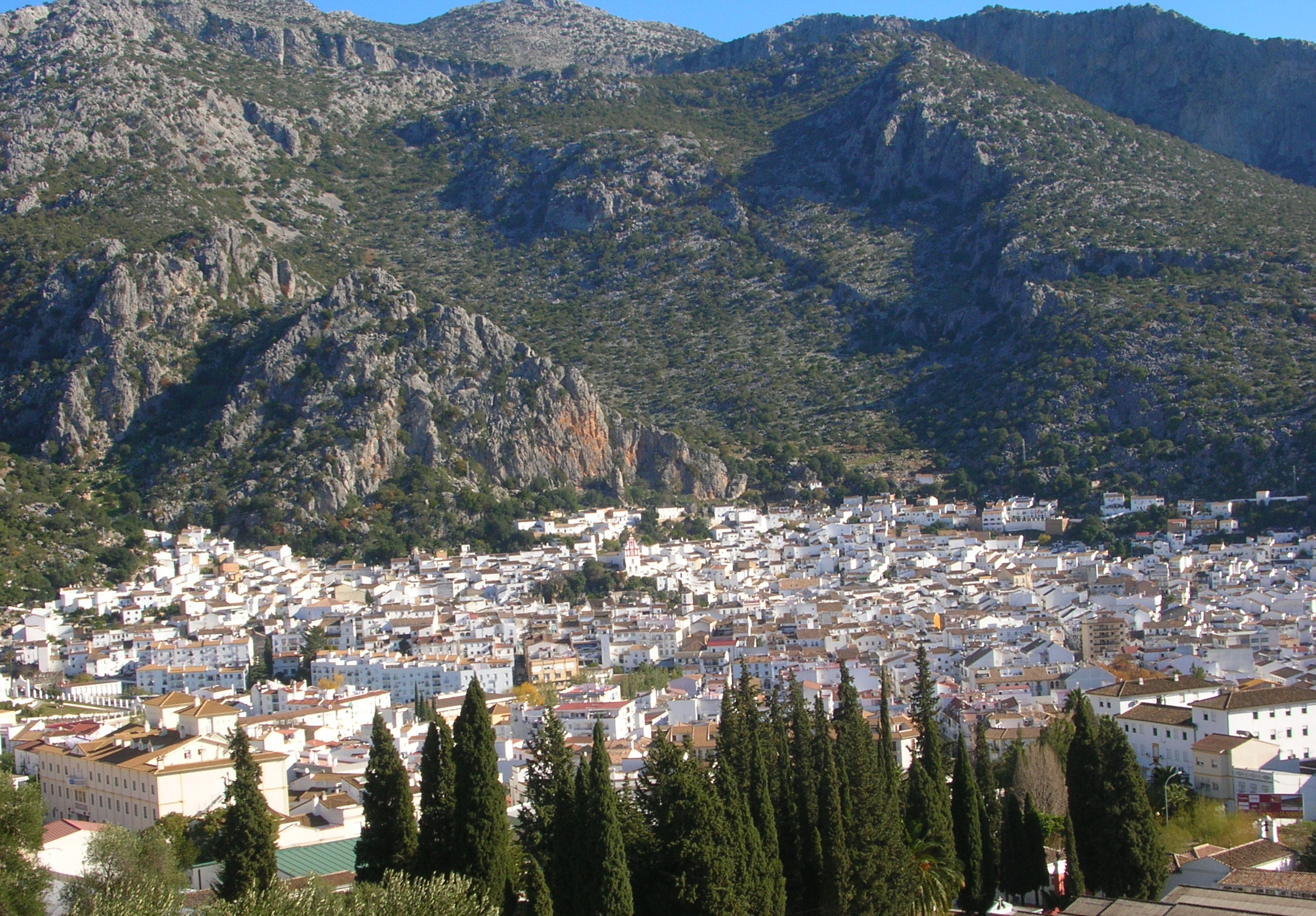 Vue générale d'Ubrique (Andalousie, Espagne)